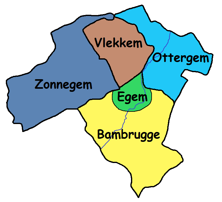 Ligging van het gehucht Egem in de deelgemeente Bambrugge en rondomliggende deelgemeenten